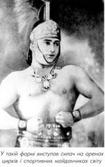 Иван Федорович Фирцак-Кротон (1899-1970)- выдающийся украинский артист цирка, атлет, борец, боксер.